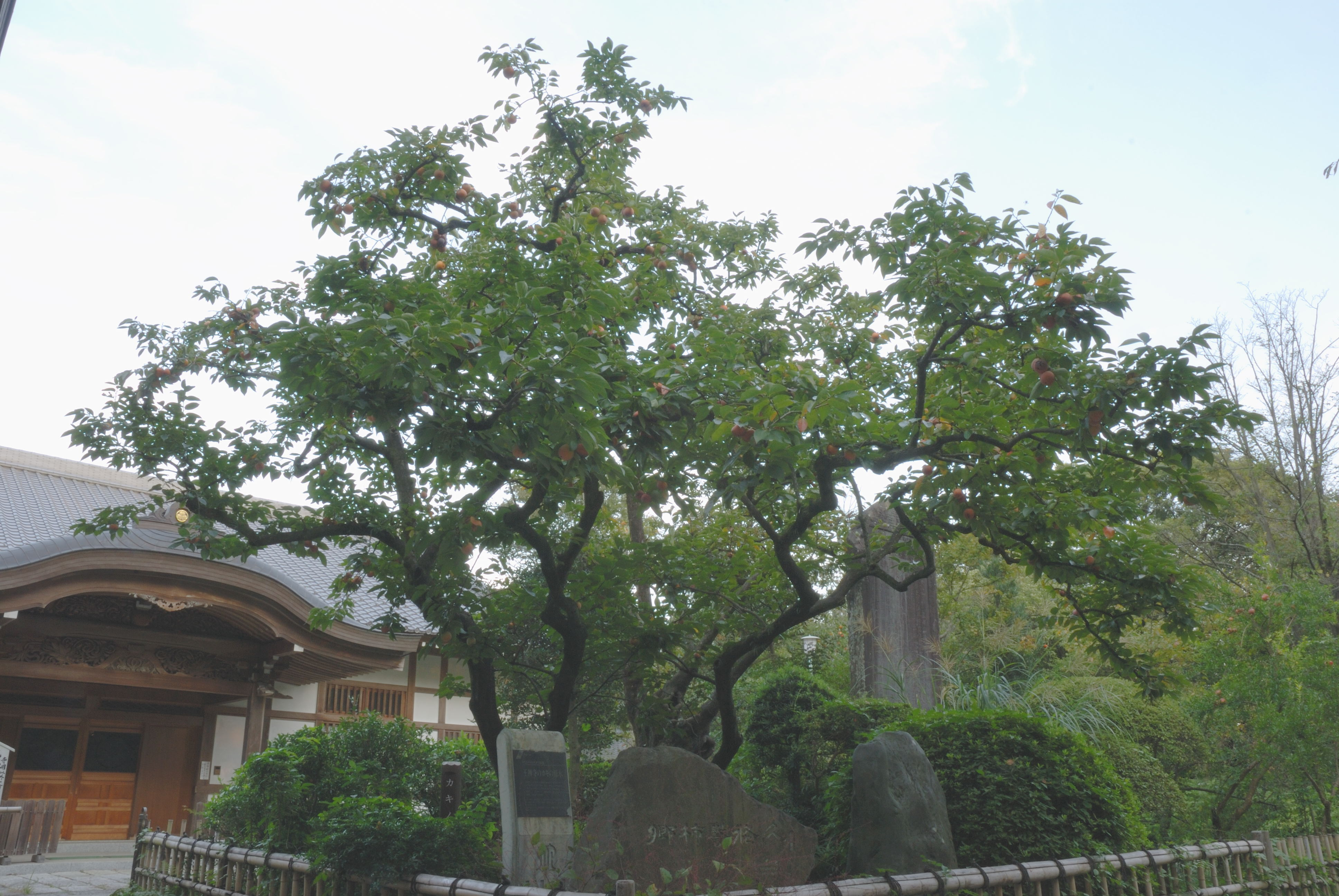 Zenjimaru genboku